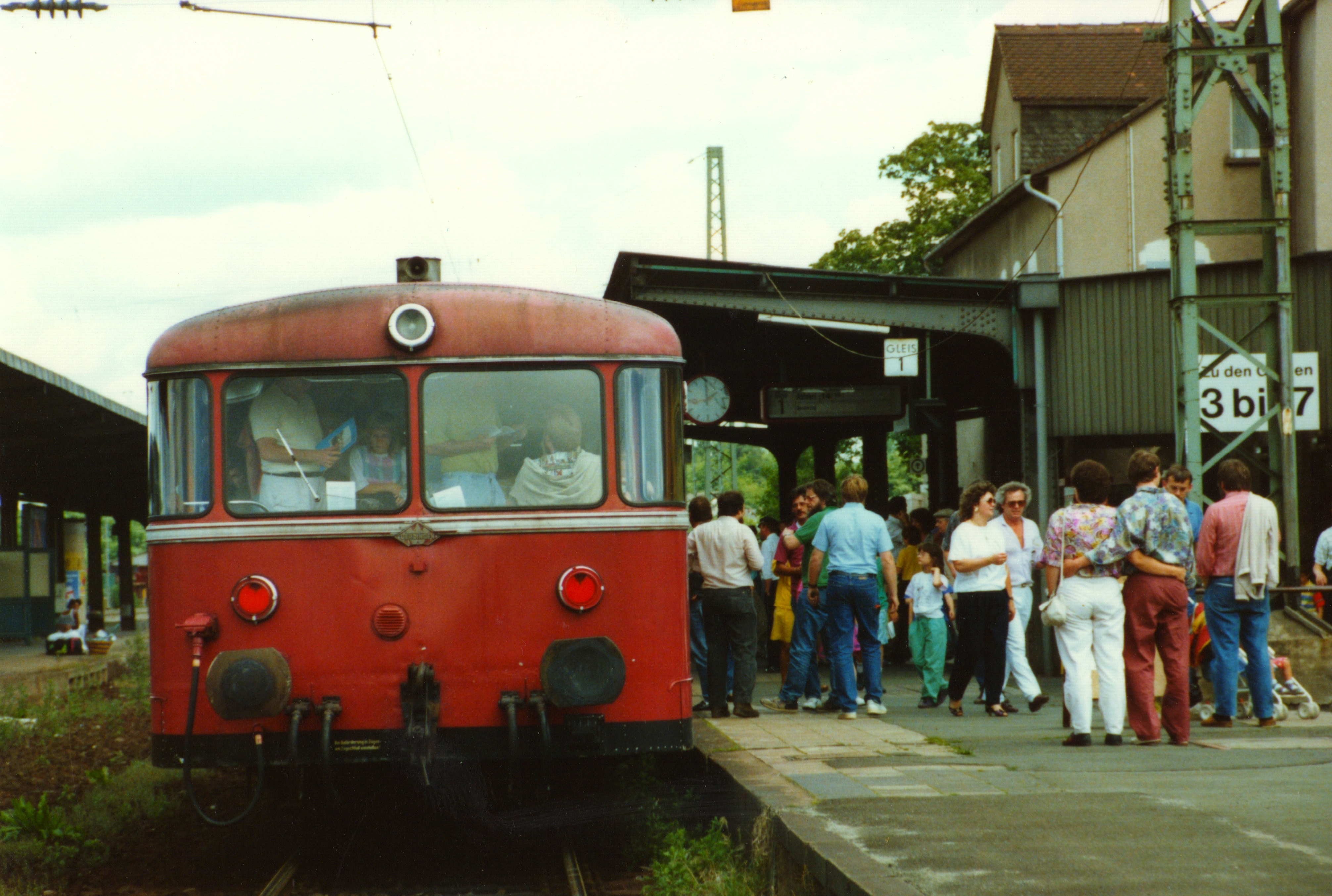 Gleis 1 im Bahnhof Wetzlar mit einem Zug auf der Kanonenbahn bei der letzten Sonderfahrt.